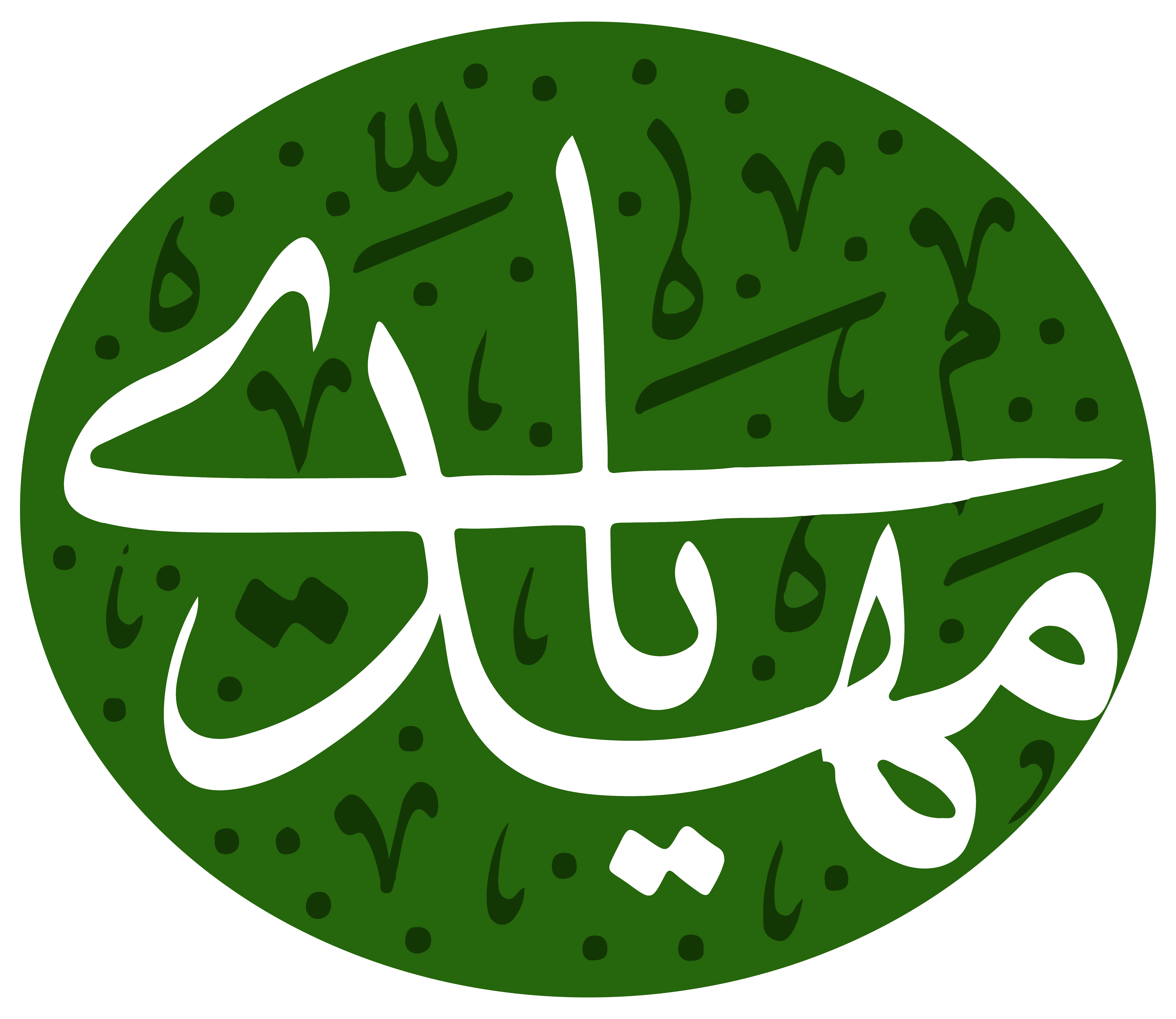 امام مهدی اعاده‌کننده دین و عدالت و منجی موعود